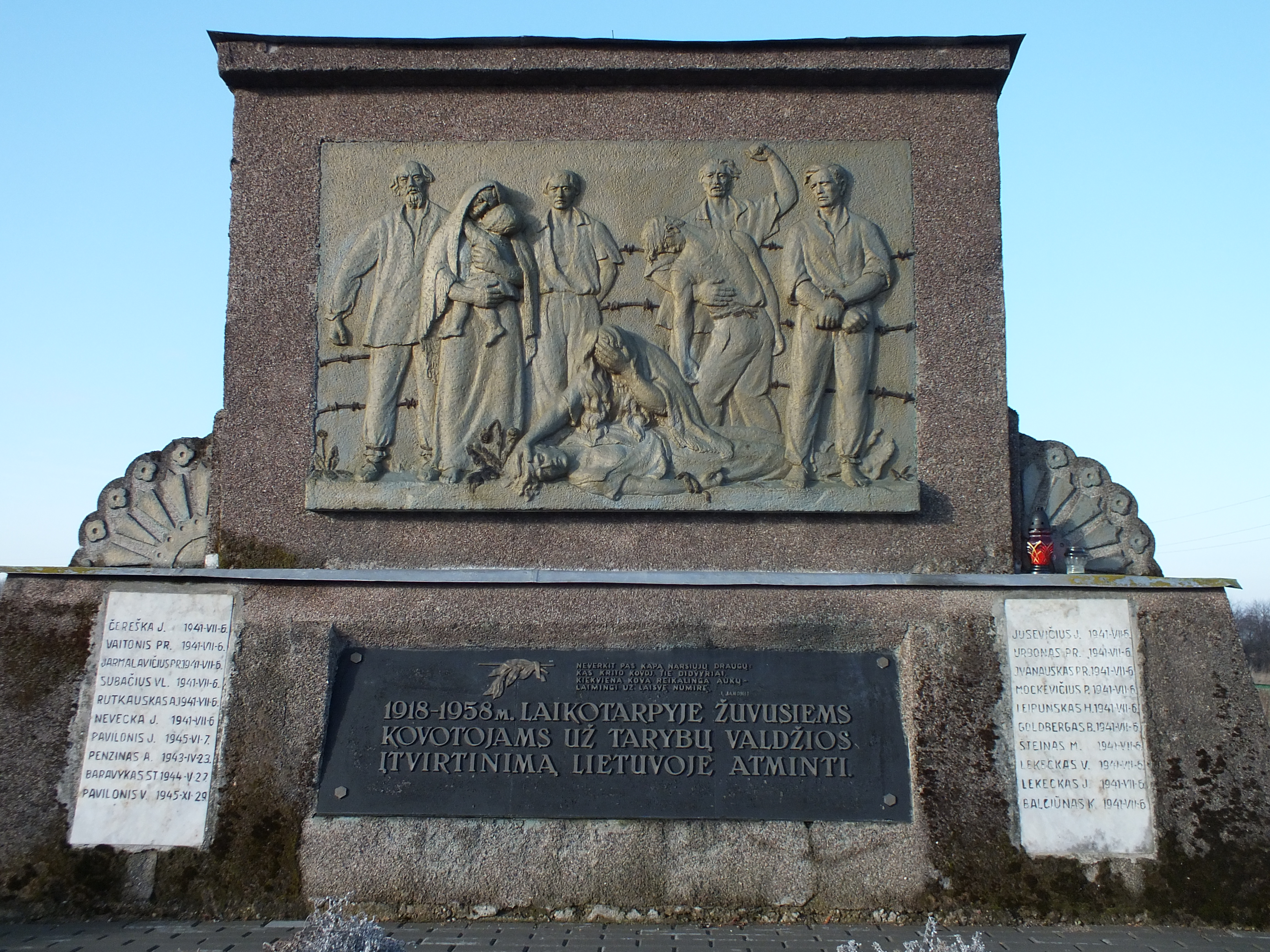 Žuvusiems už Tarybų valdžią